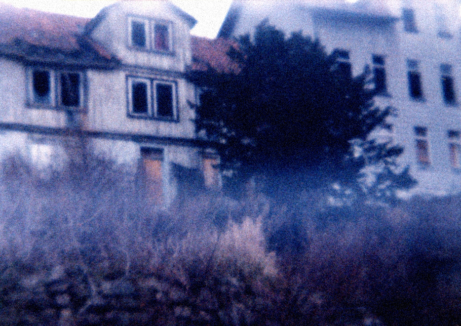 Ruine von Hotel Andree’s Berg mit dem Betten- und Wirtschafstrakt vor dem Abriss, Recherchefoto des Autors Alban Nikolai Herbst zum Roman Wolpertinger oder Das Blau